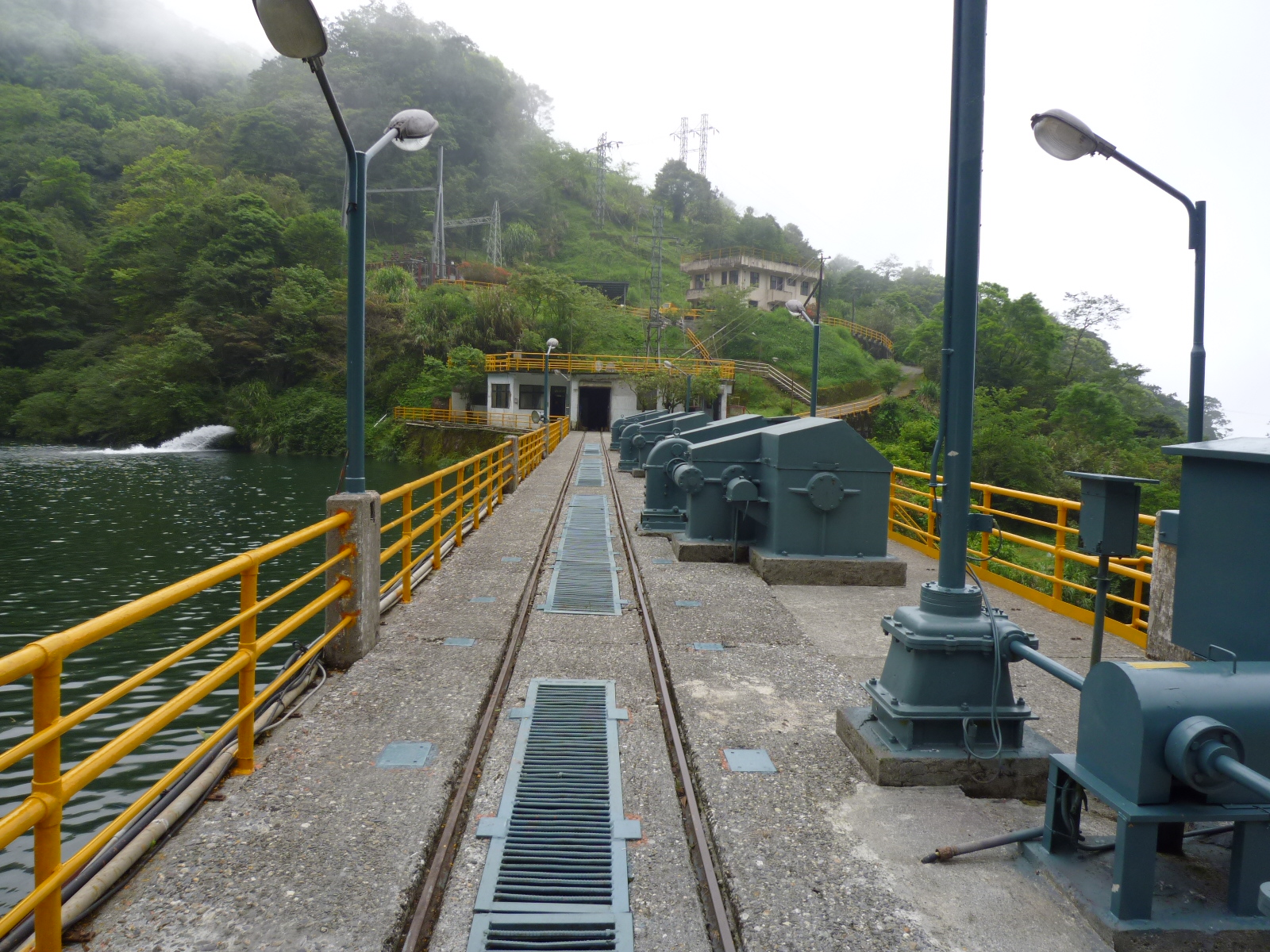 臺灣電力公司東部發電廠-龍溪壩